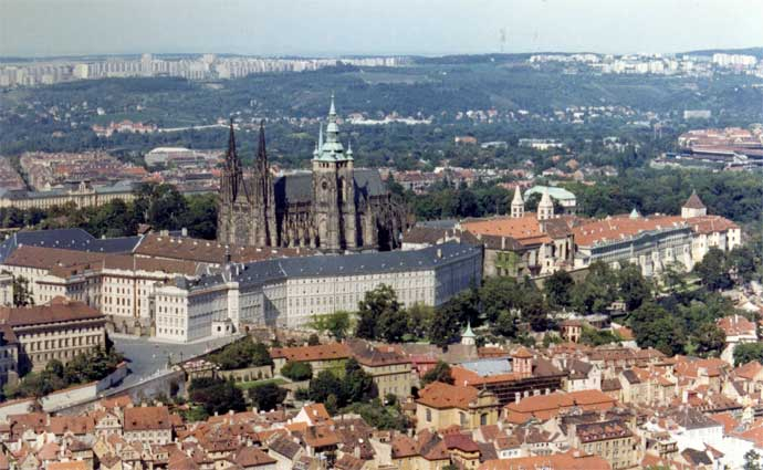 Praha